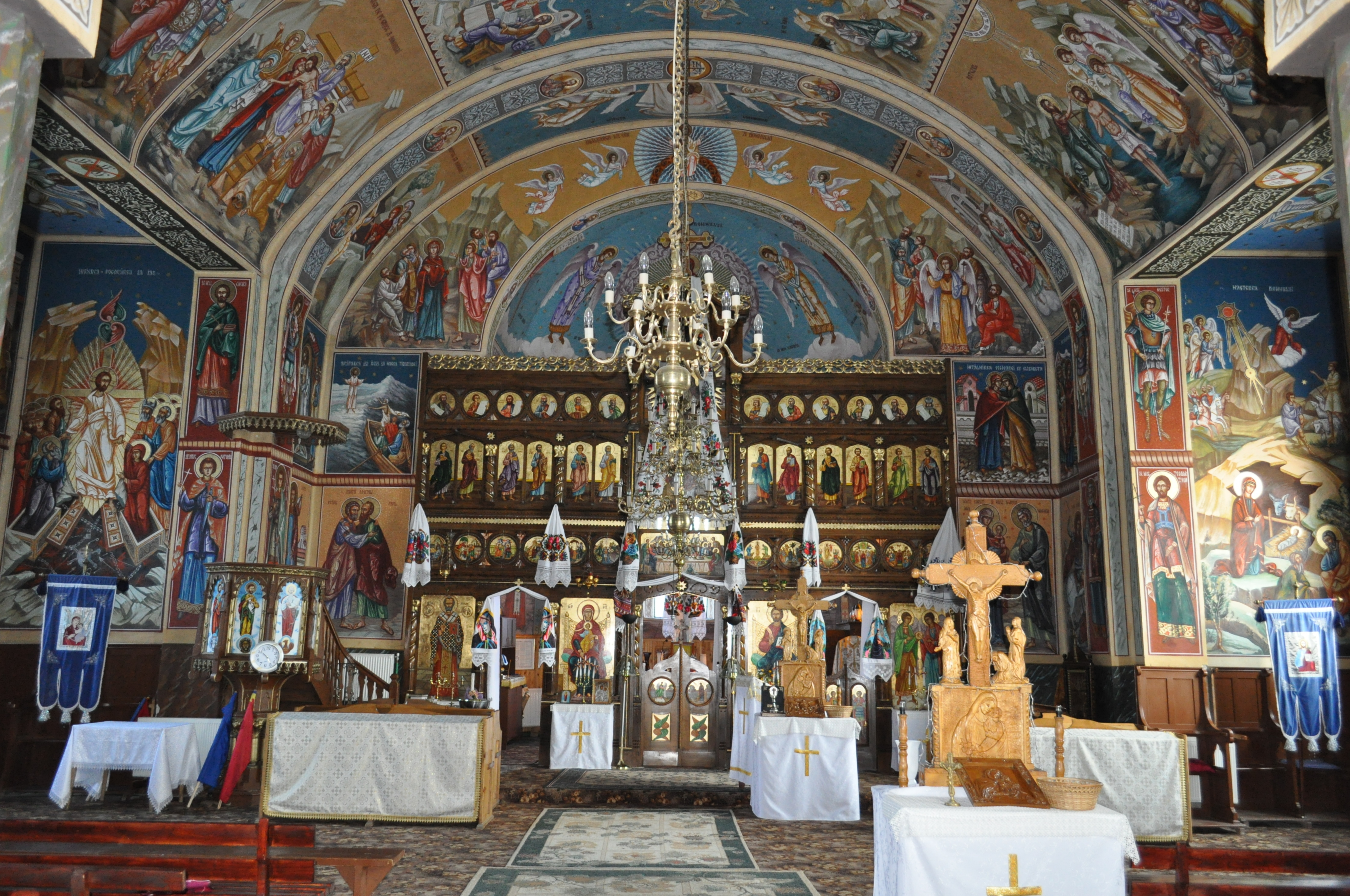 Biserica ortodoxă de zid „Sfinții Împărați Constantin și Elena”, oraș Borșa, județul Maramureș